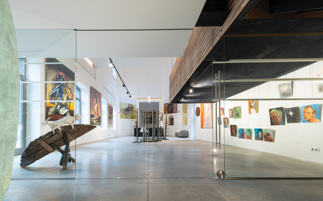 interieur van de vernieuwde Andrieskapel tijdens TEFAF 2020 met de internationale kunstexpositie van de Londense galeriehouder E. von Baeyer